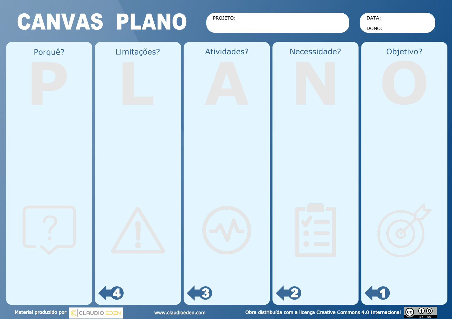 CANVAS PLANO em formato A3 para impressão.